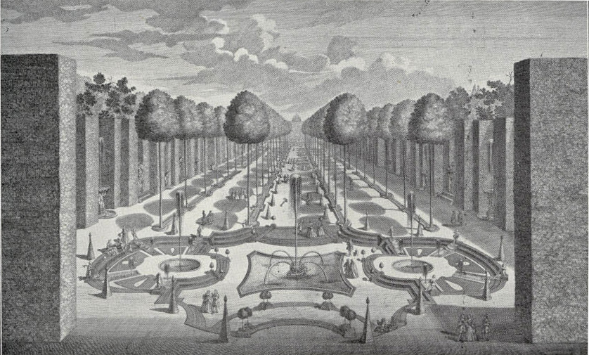 "Prospect der von rechter Hand deß Eingangs gelegenen und mit Maroniern besetzten großen Promenade" - Detailansicht der Promenade in der Favorite nach einem Stich von Salomon Kleiner, 1726